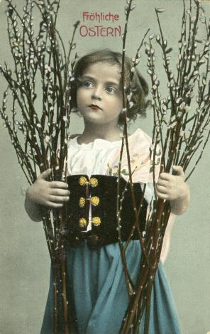 Osterpostkarte